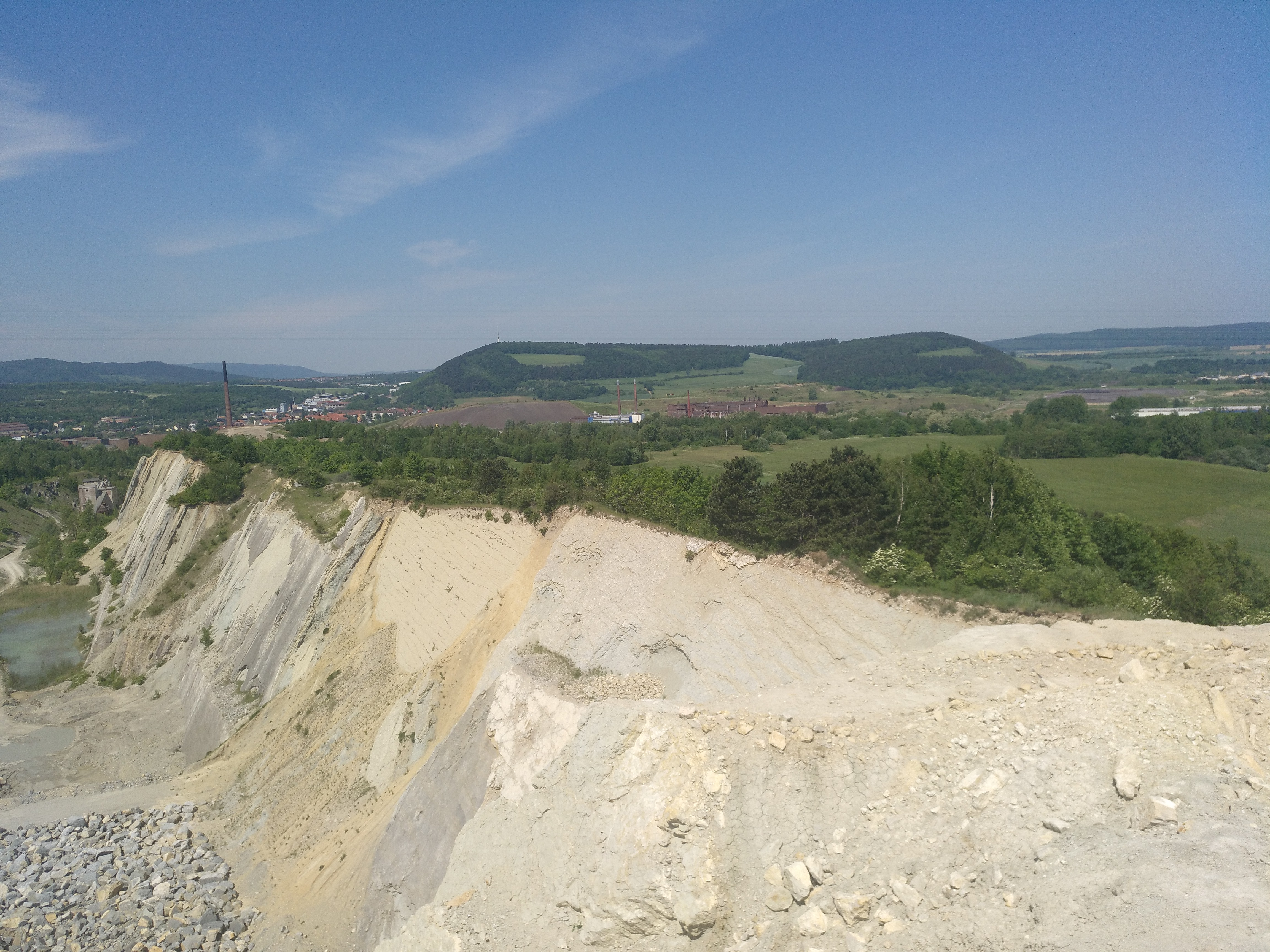 Nordwestperspektive auf den Kalksteinbruch Langenberg mit Oker + Sudmerberg/Umland im Hintergrund.